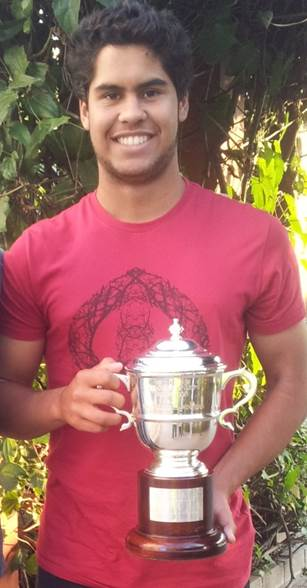 O tenista brasileiro Marcelo Zormann com a taça recebida pela vitória em duplas juvenil com Orlando Luz, em Wimbledon 2014